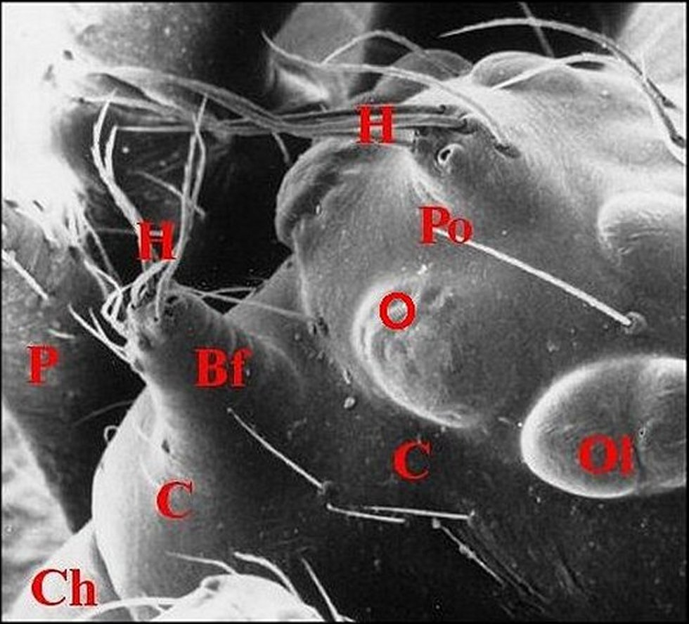 Argyrodes borbonicus mâle. Prosoma vu au microscope électronique à balayage.